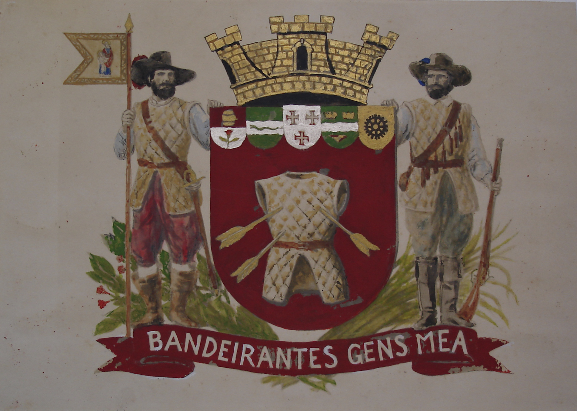 Obra que integra o acervo do Museu Paulista da USP. Coleção José Wasth Rodrigues - CJWR